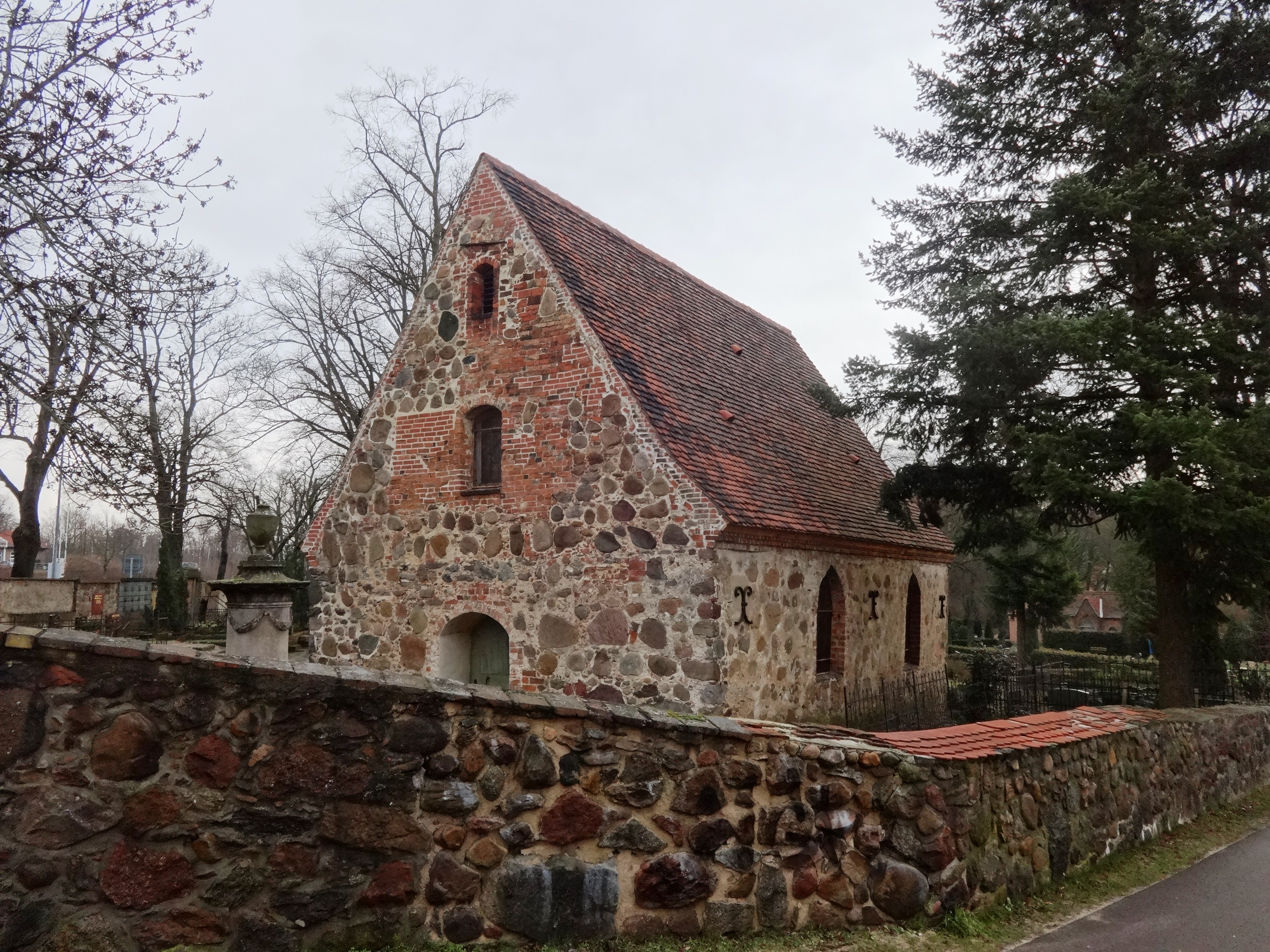 Die Gertraudenkapelle ist ein spätgotischer Feldsteinbau aus der zweiten Hälfte des 15. Jahrhunderts. Sie diente zunächst als Herberge für Kranke und Bedürftige und wird im 21. Jahrhundert als Friedhofskapelle genutzt. Im Innern befinden sich einige Reste der Wandmalereien aus der Bauzeit der Kirche.